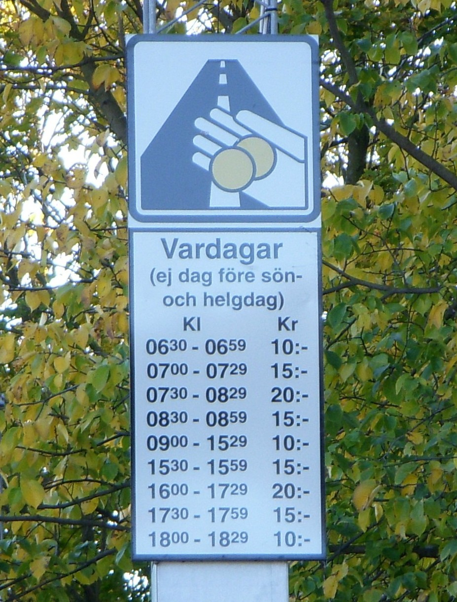 Skylt för trängselskatt-tider vid Skansbron